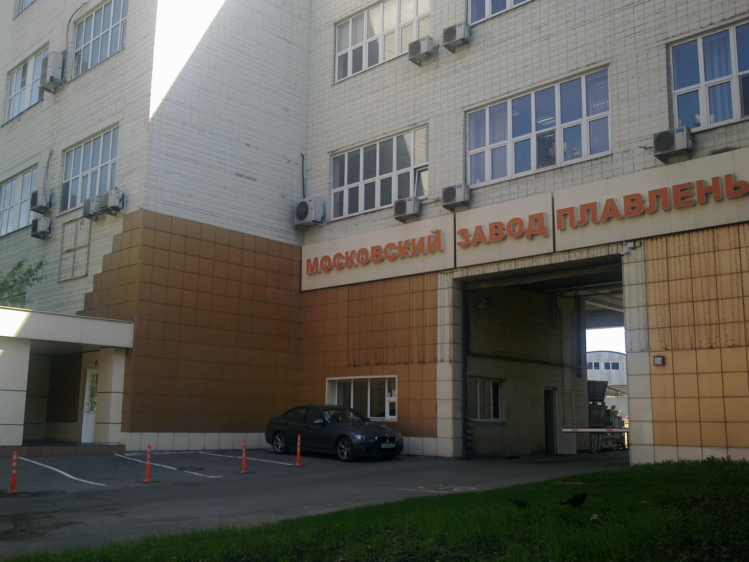 Въезд и проходная завода «Карат»